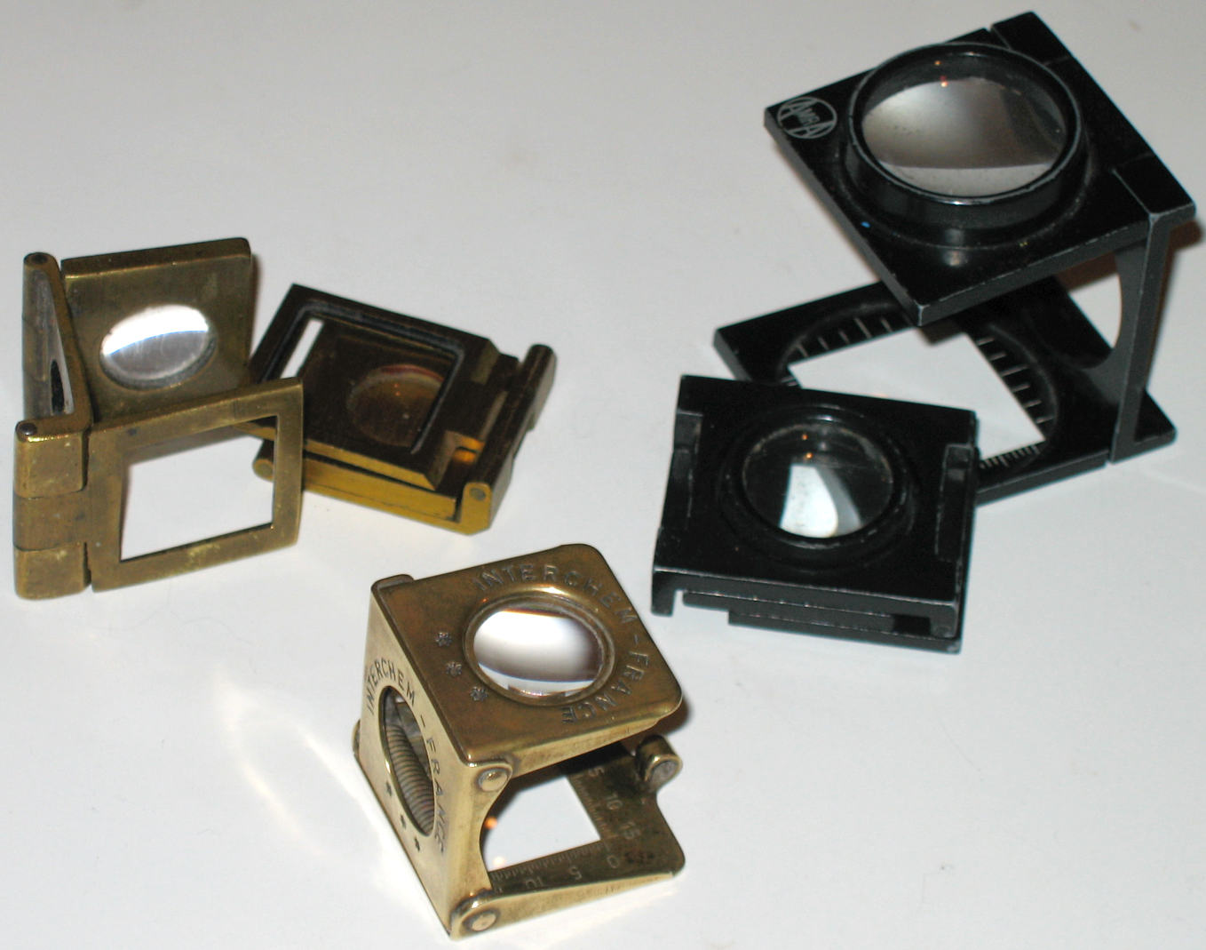 Petites loupes pliantes utilisées dans le textile sous le nom de "quart de pouce", et dans l'industrie graphique sous le nom de "compte-fils" Outils personnels (industrie graphique) Photo perso : Dominique grassigli